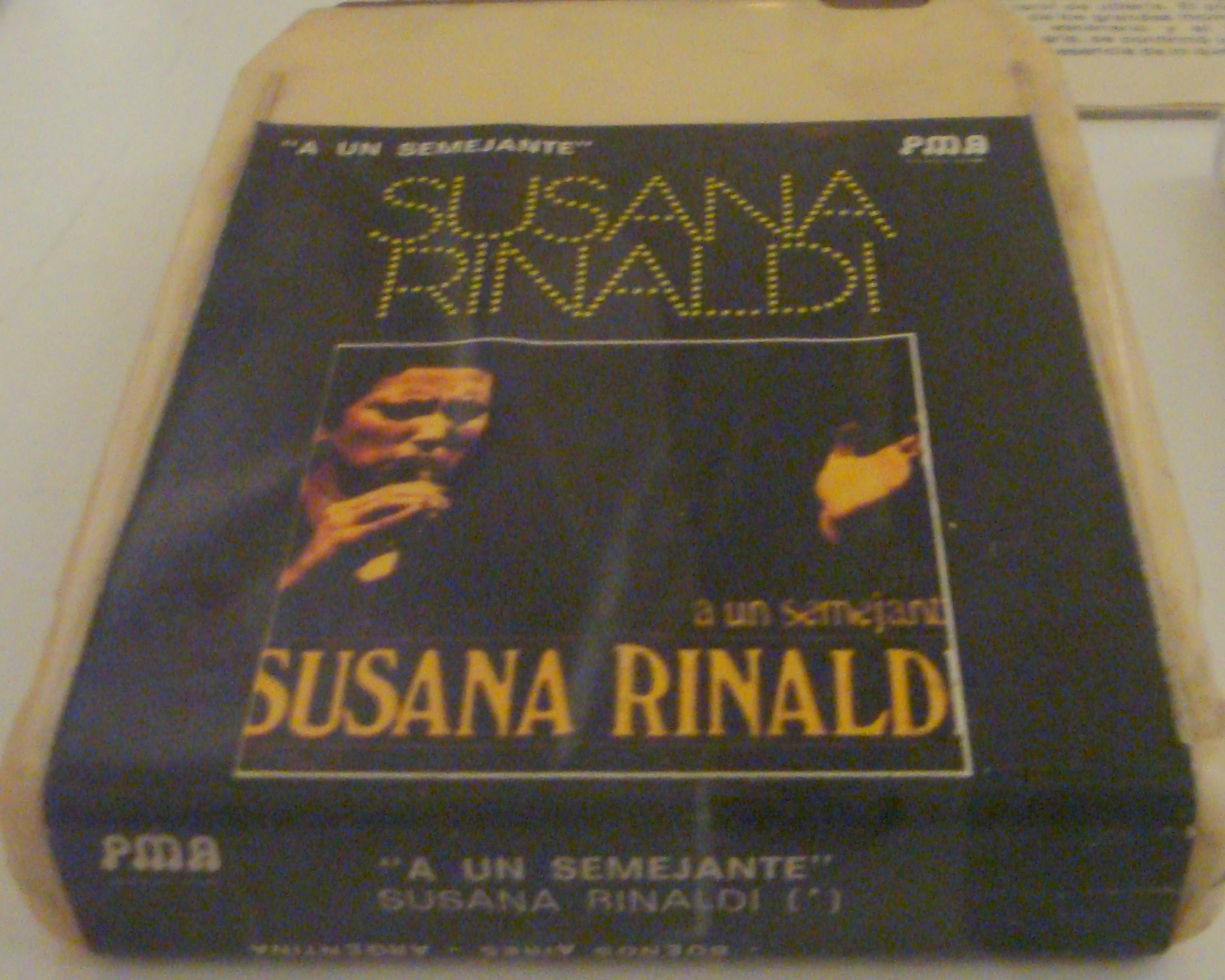 Cassette Magazine exhibido en la Casa Rosada